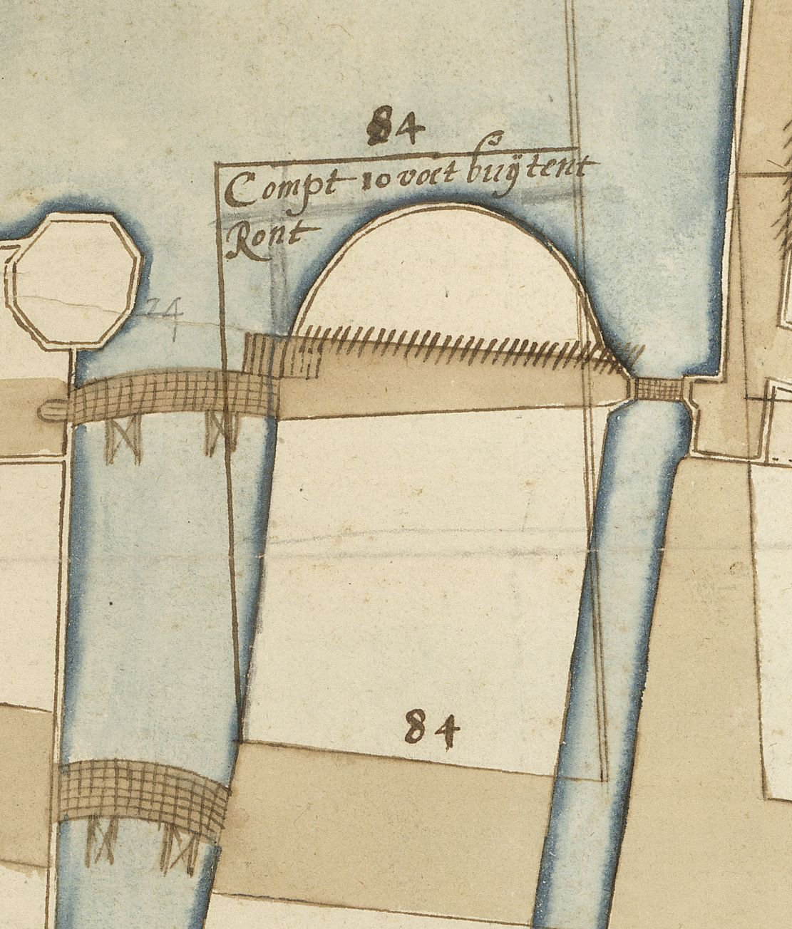 Platte grond van het Plein en het Akerland met concept verandering in den Vijver, tot het bouwen van het Mauritshuis (1640).